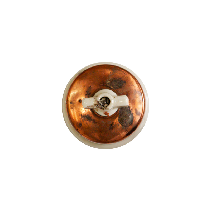 Wyłącznik pokrętny porcelanowy, 1921 rok.